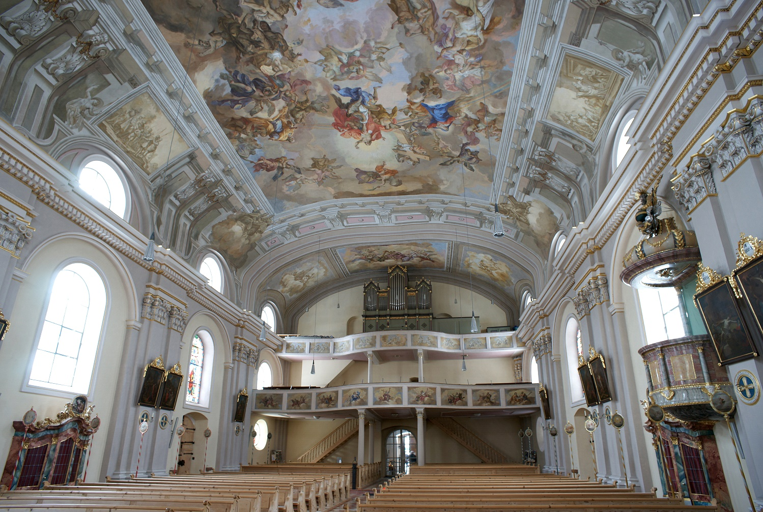 Kath. Pfarrkirche hl. Nikolaus Innenansicht